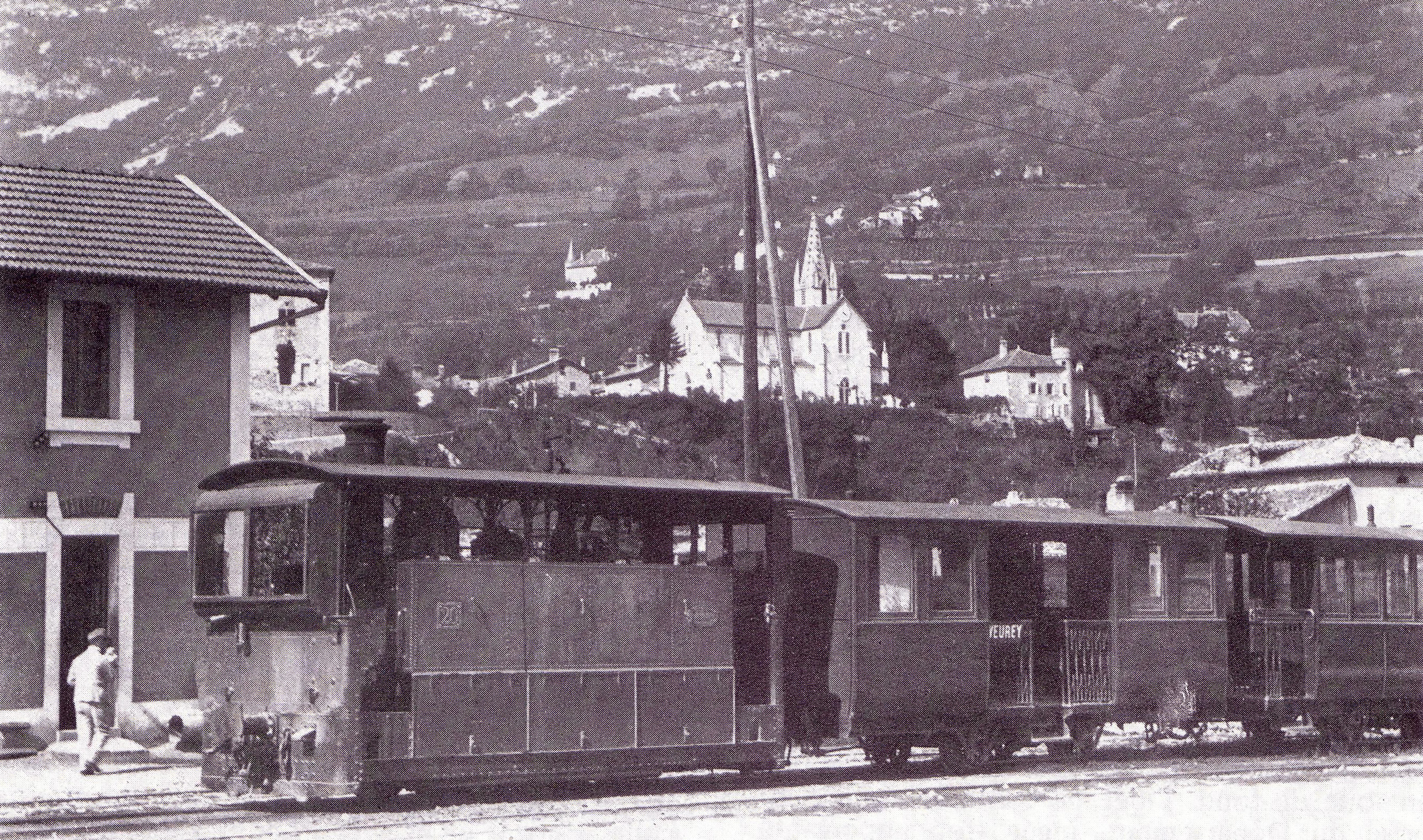 Une rame des Chemins de fer économiques du Nord en Gare de Veurey, tractée par la locomotive bi-cabine n°20